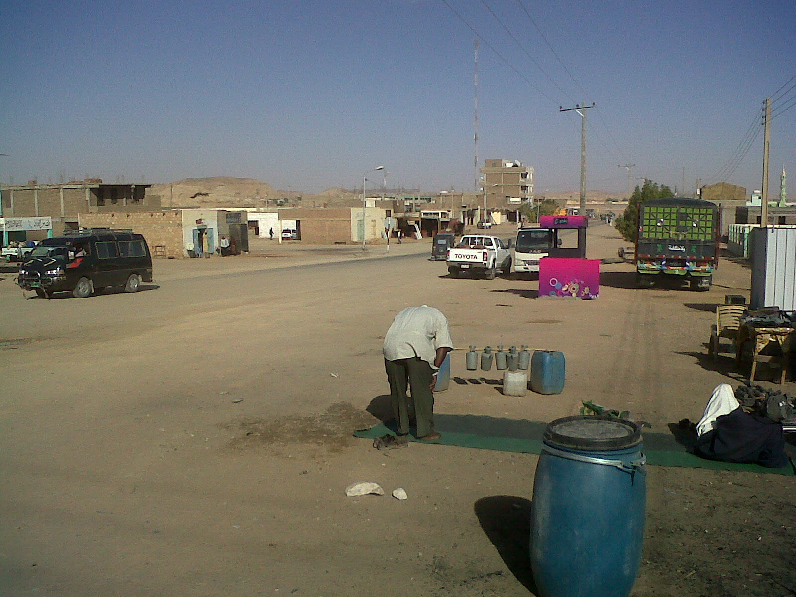 وادي حلفا-السوق الجديد